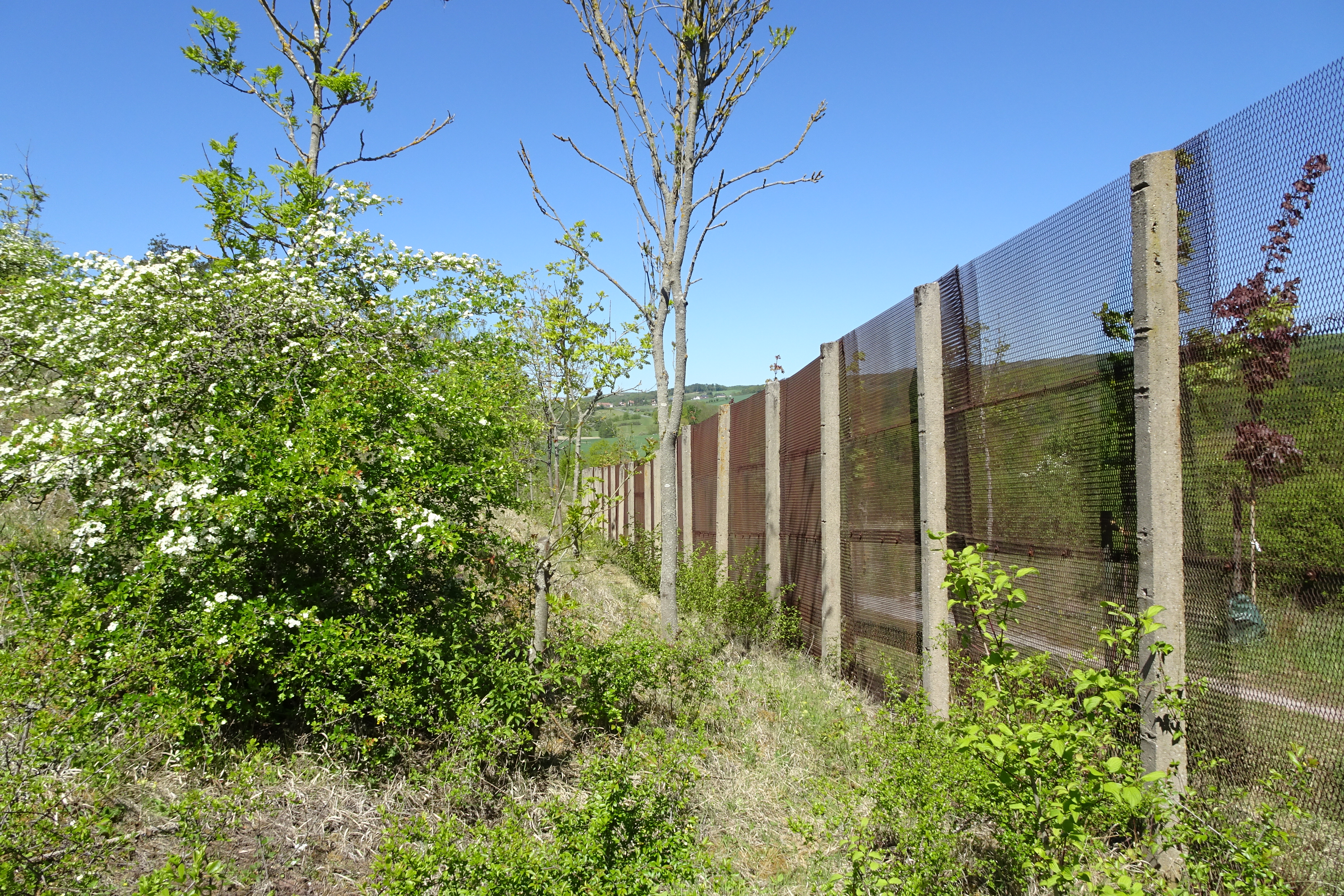 Das „Baumkreuz bei Ifta“ wurde am 16. und 17. November 1990 mit 140 Bäumen auf der ehemaligen deutsch-deutschen Grenze, als „Start-Skulptur“, für eine West und Ost verbindende Allee zwischen Kassel und Eisenach gepflanzt. Das Baumkreuz besteht aus einer Eschenallee auf dem früheren Grenzstreifen, die eine Lindenallee entlang der Bundesstraße, die Thüringen mit Hessen verbindet, kreuzt. Zwischen den drei Eschenreihen steht der Grenzzaun, einer der längsten noch original erhaltenen Teile in Deutschland. Die „Aktion Baumkreuz“ knüpfte an den „Erweiterten Kunstbegriff“ von Joseph Beuys an, den dieser mit dem Projekt „7000 Eichen“ in Kassel verbunden hatte. Seit 1990 kommen jedes Jahr im November Menschen aus ganz Deutschland und helfen mit, das Projekt fortzupflanzen. Es ist mittlerweile auf mehr als eintausend Bäume angewachsen. Getragen wurde die Aktion bis 2014 von dem inzwischen gelöschten „Unternehmen Wirtschaft und Kunst – erweitert“, danach vom BUND Thüringen. Angelegt wurde das Baumkreuz dort, wo die Bundesstraße 7 die thüringisch-hessische Landesgrenze durchquert. Der Bereich gehört zu der Gemarkung von Ifta, einem Stadtteil von Treffurt im westthüringischen Wartburgkreis und grenzt an die Gemarkung von Lüderbach, einem Ortsteil der Gemeinde Ringgau im nordhessischen Werra-Meißner-Kreis.